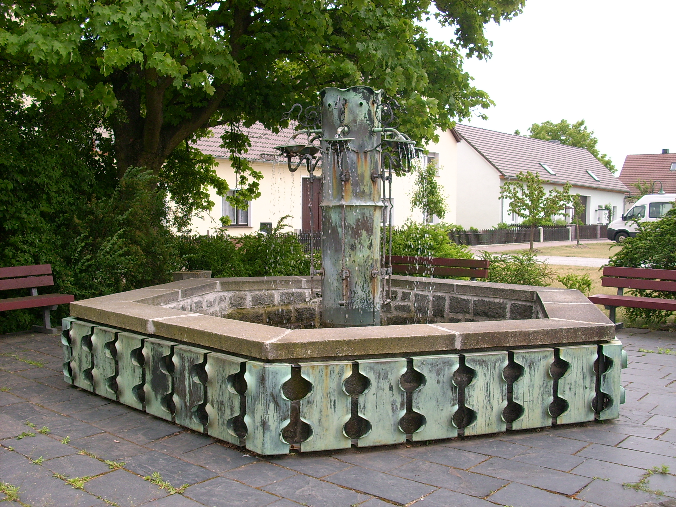 Brunnen in Seidewinkel (Elsterheide)